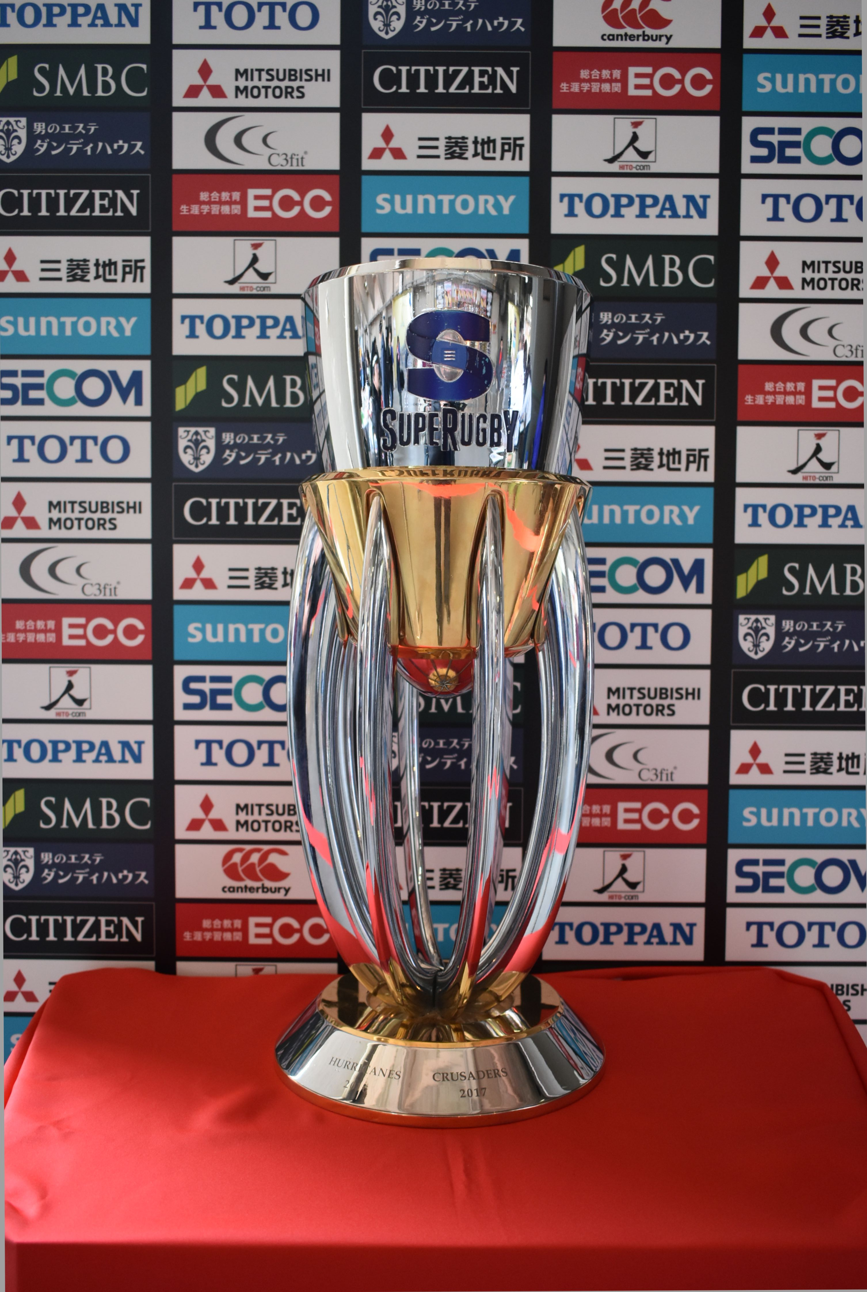 スーパーラグビー トロフィー Nikon D3400